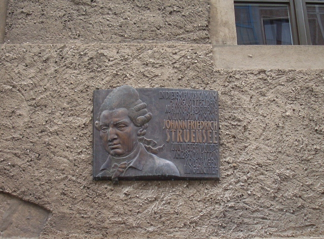 Gedenktafel zu Ehren von Johann Friedrich Struensee am Pfarrhaus der Moritzkirche, An der Moritzkirche 7, Halle (Saale)